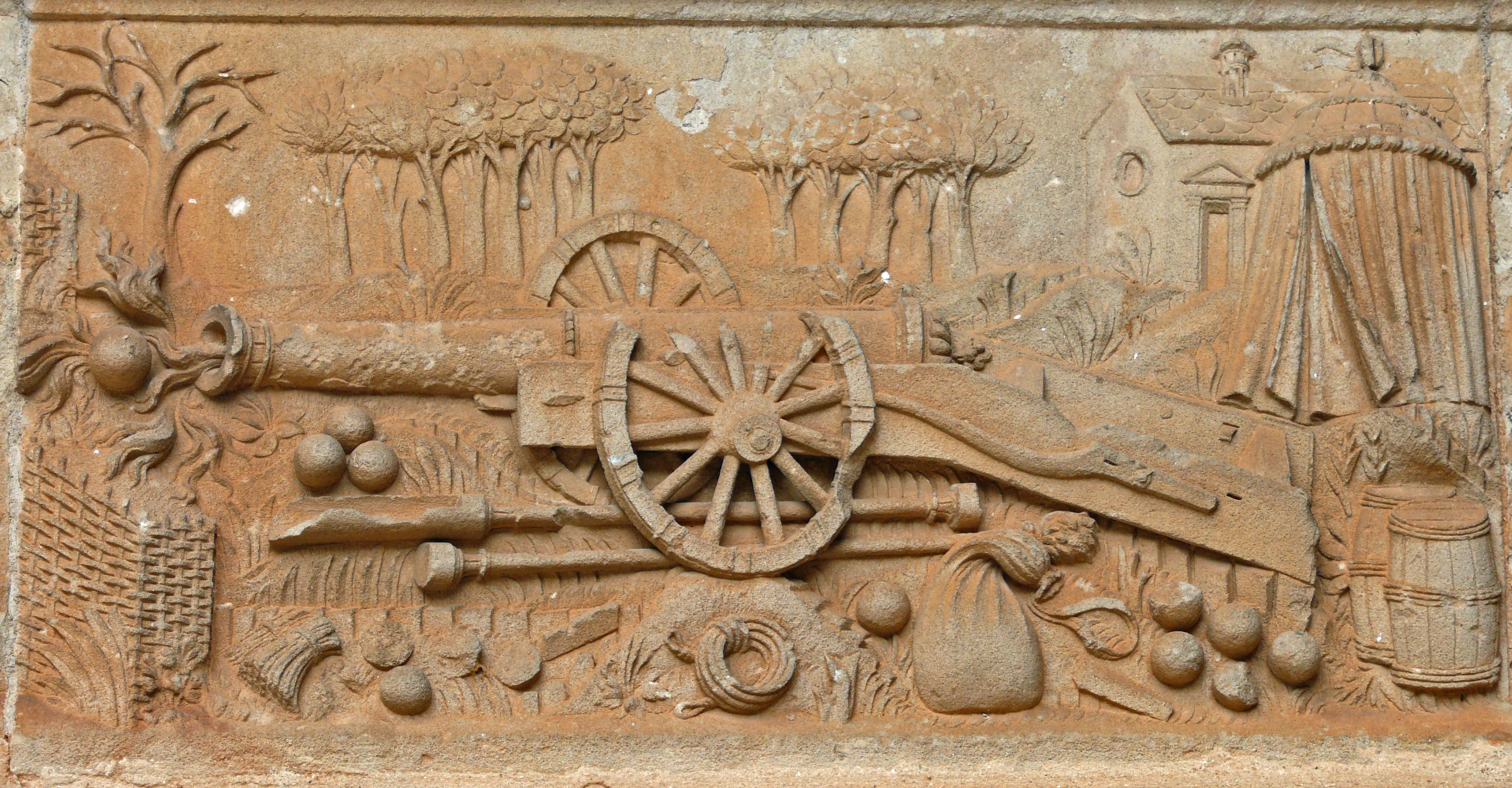 Assier - Frise sculptée de l'église Saint-Pierre - Couleuvrine bâtarde avec son attirail complet